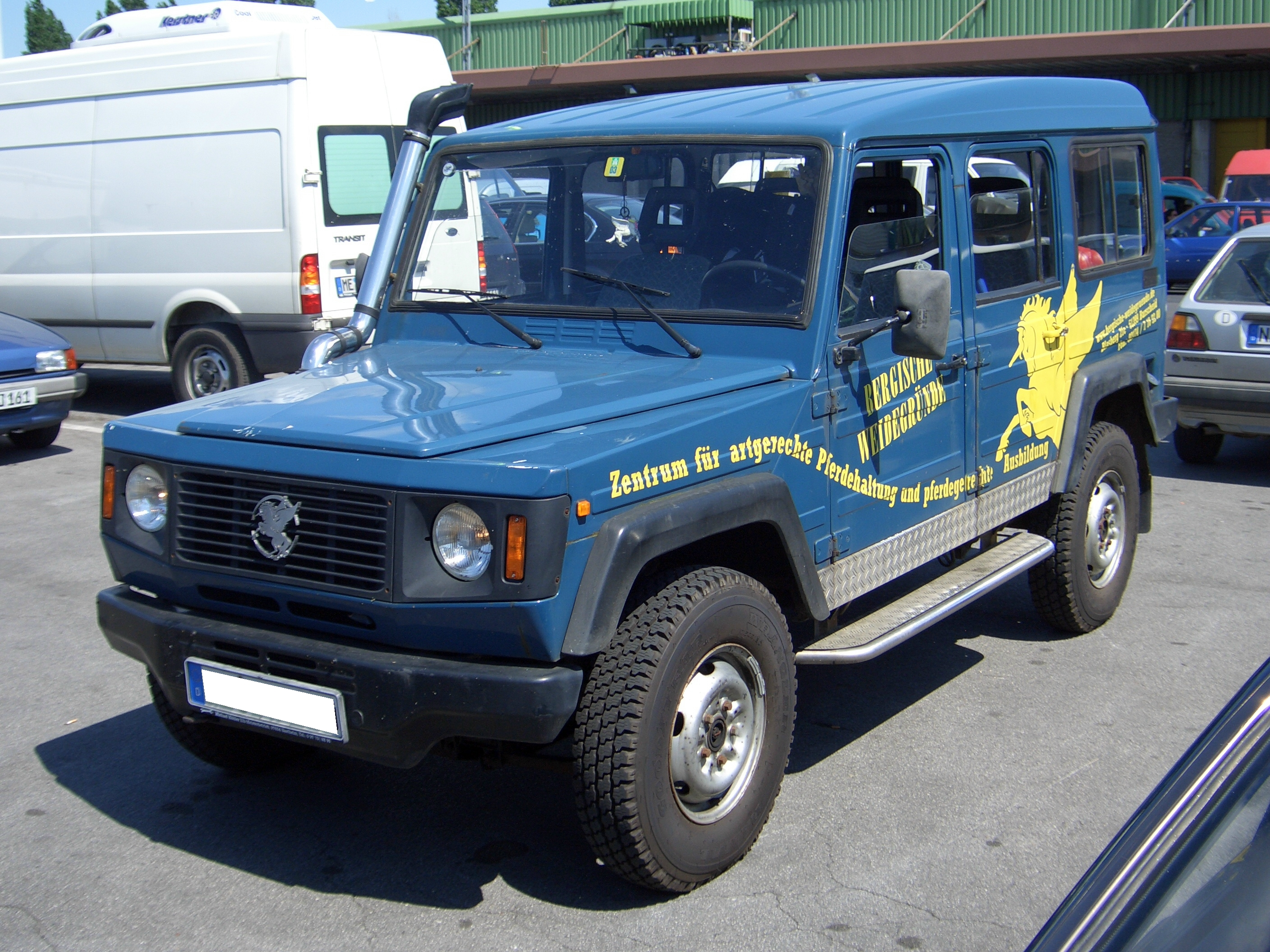 Bajaj Tempo TEMPO TRAX JUDO 4x4, seen in Düsseldorf, Germany